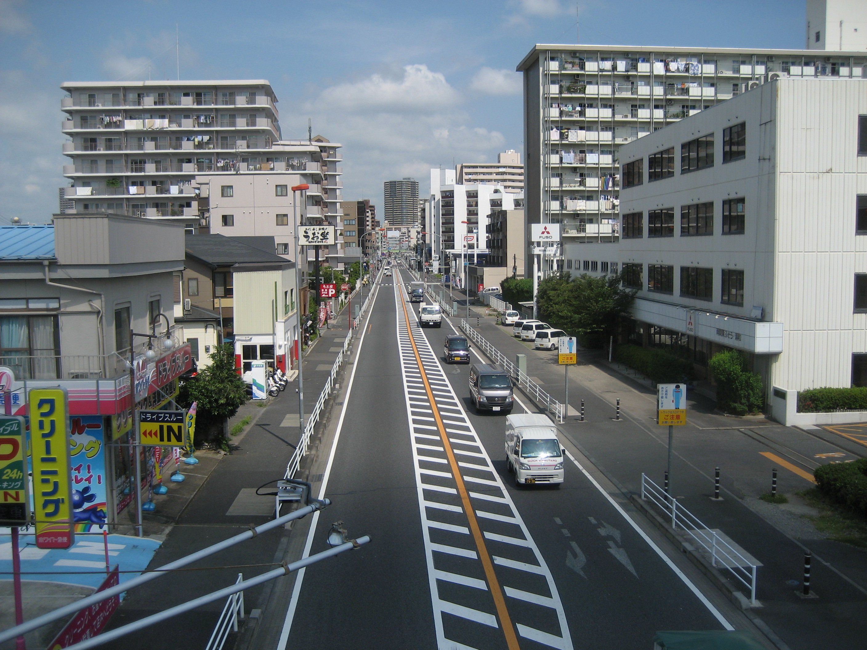 国道17号線さいたま市南区辻・根岸付近 浦和区方面を撮影